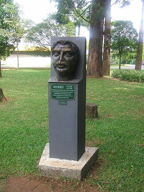 Chico Mendes, 1999. Escultura de Heloísa Quintanilha Ribeiro no Parque do Ibirapuera, São Paulo, Brasil.